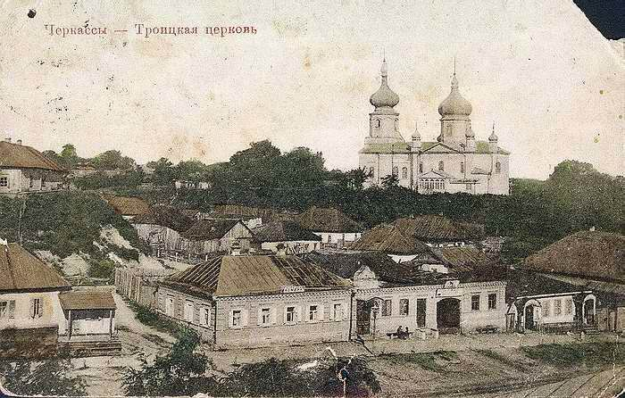 Троїцька церква